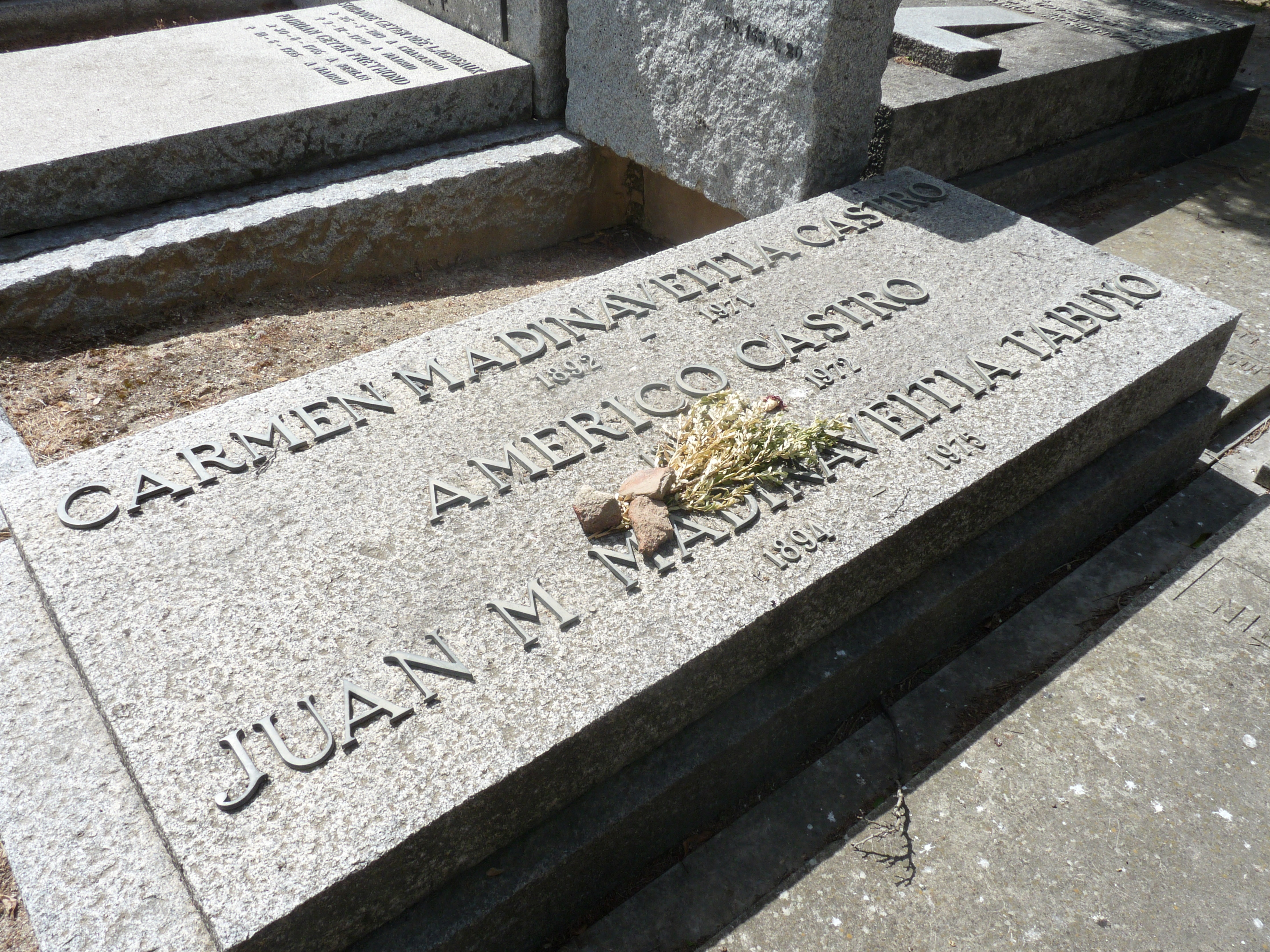 Tumba de Carmen Madinaveitia Castro, Américo Castro y otros.